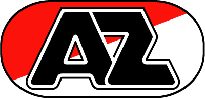 Logo AZ